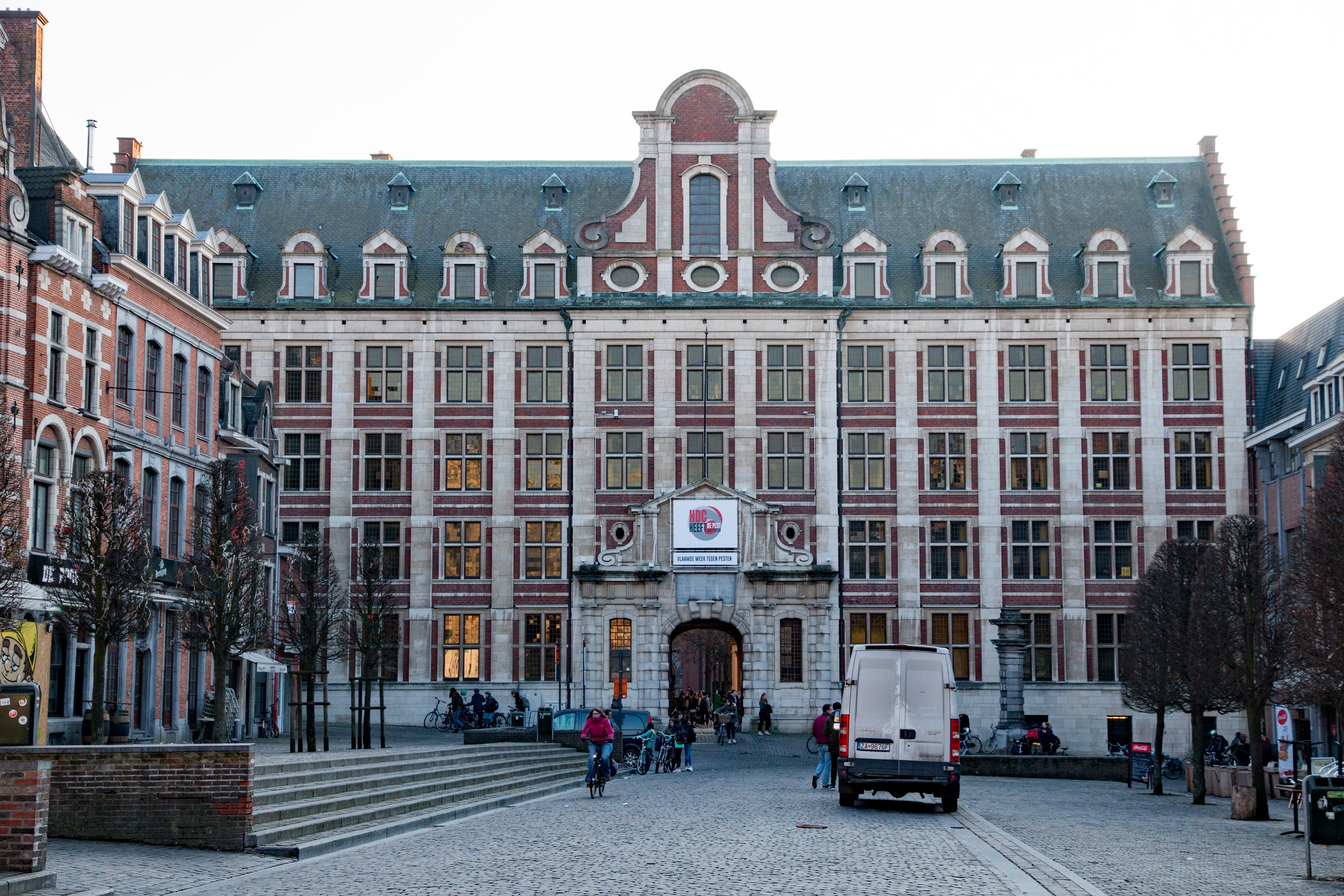 Heilig Drievuldigheidscollege in Leuven